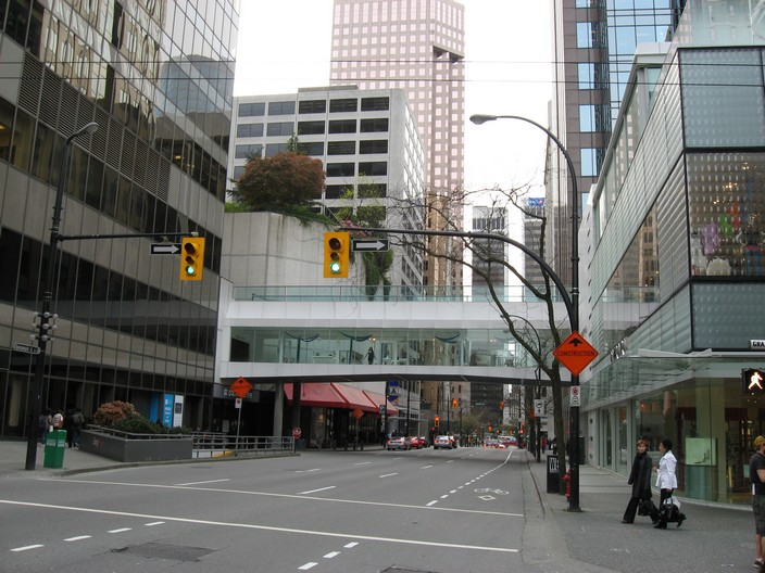 Ванкувер